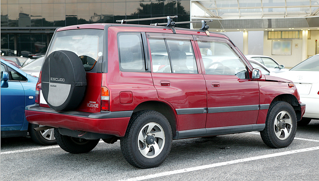 Suzuki Escudo Nomade 1600 ( JDM )